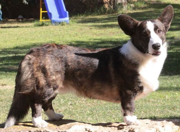 כלב מגזע וולש קורגי קרדיגן